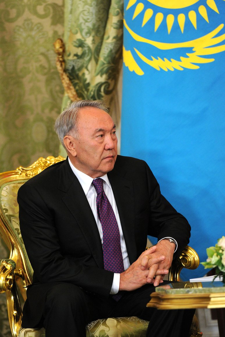 Встреча Владимира Путина с Нурсултаном Назарбаевым